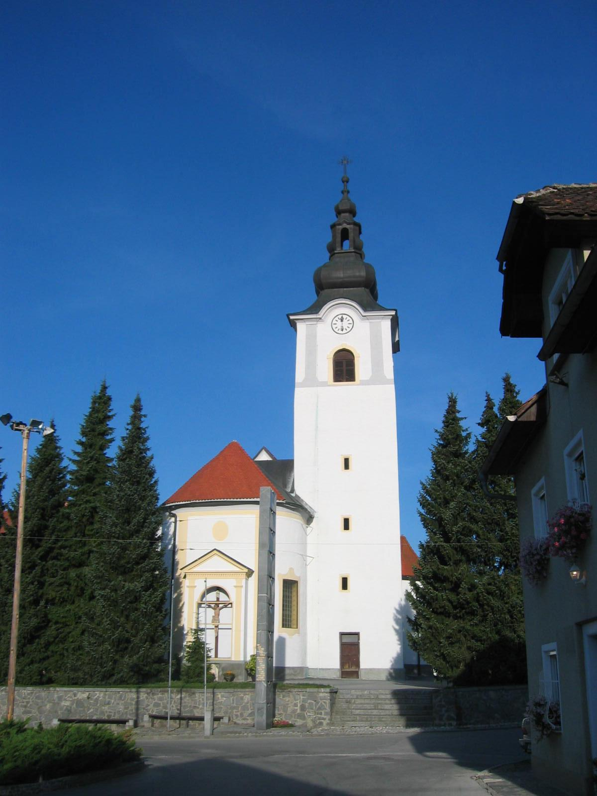 St. Kancijan church, Rečica ob Savinji, village in Slovenija photo:Ziga 20:04, 18 August 2006 (UTC)